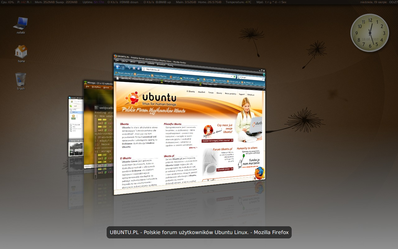 Shift Switcher - jedna z wtyczek prezentująca nowe możliwości Compiz Fusion